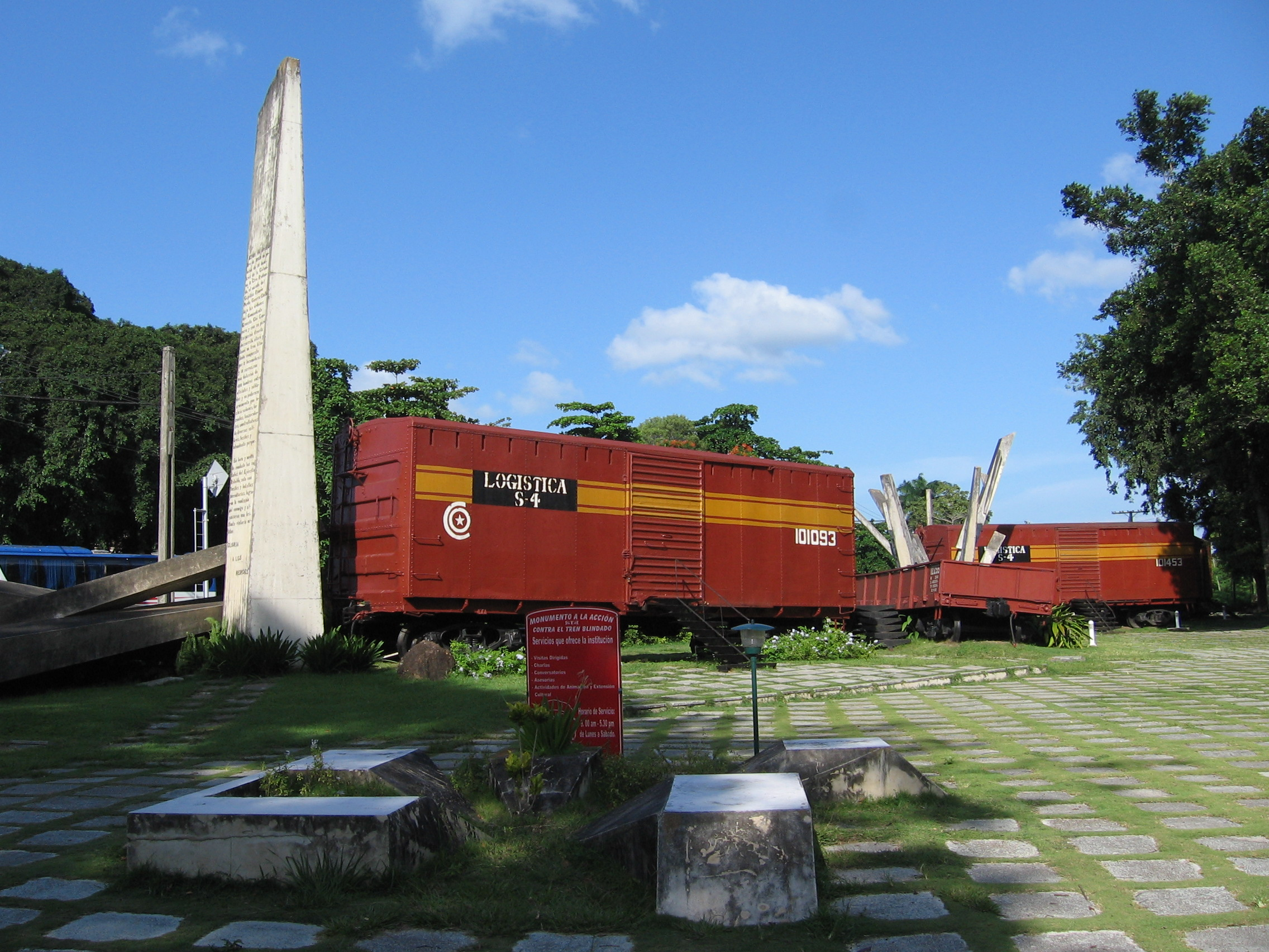 Monumento al Asalto al tren blindado en Santa Clara